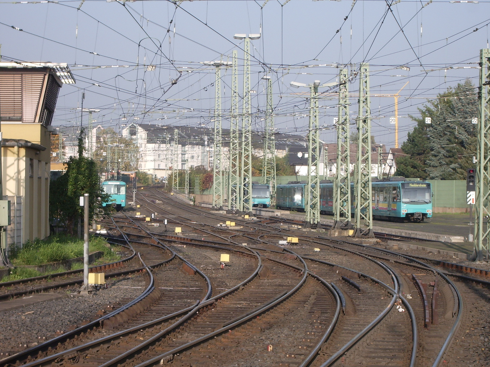 VGF light rail trainyard Heddernheim, Frankfurt am Main, October 28, 2005. VGF-Betriebshof Heddernheim, Frankfurt am Main, 28. Oktober 2005.